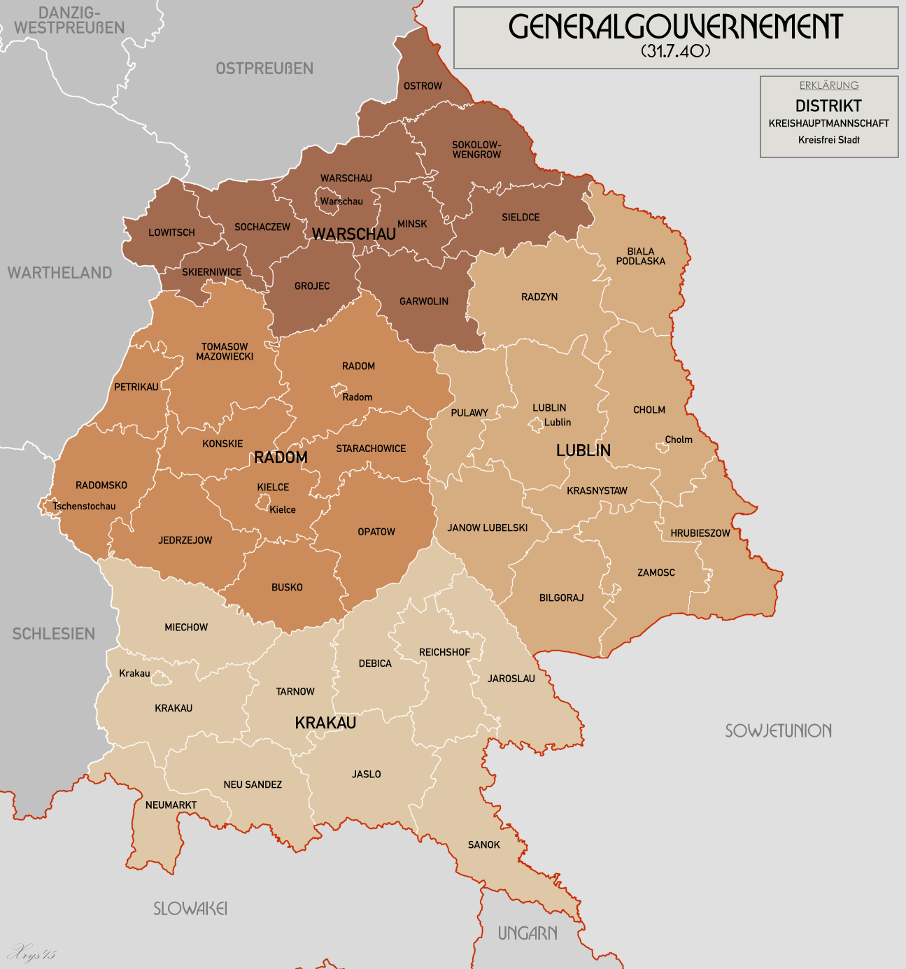 Verwaltungskarte des Generalgouvernenments in 1940, vor der Fall Barbarossa. Grundkarte: Karte des Deutschen Reiches 1:100k, Mapa Administracyjna Rzeczypospolitej Polska 300k (Quelle mapyWIG).